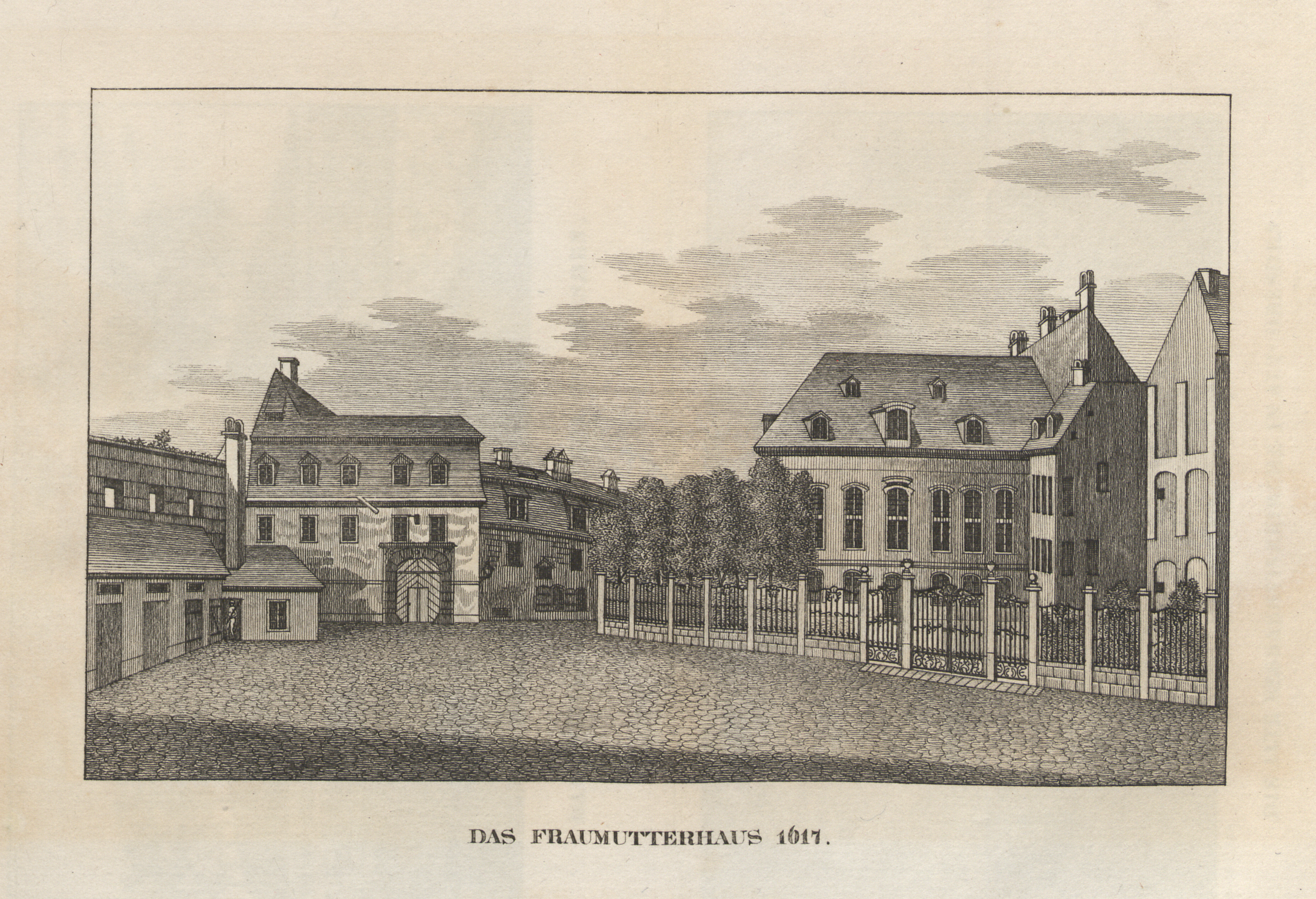 siehe Bildbeschreibung aus: Abbildungen von Dresdens alten und neuen Pracht-Gebäuden, Volks- und Hof-Festen. Untertitel: Kupferheft zur Chronik der Kgl. Sächs. Residenz-Stadt Dresden und des Sammlers für Geschichte und Alterthum, Kunst und Natur im Elbthale. In der Ch. Fr. Grimmerschen Buchhandlung, Dresden 1835.